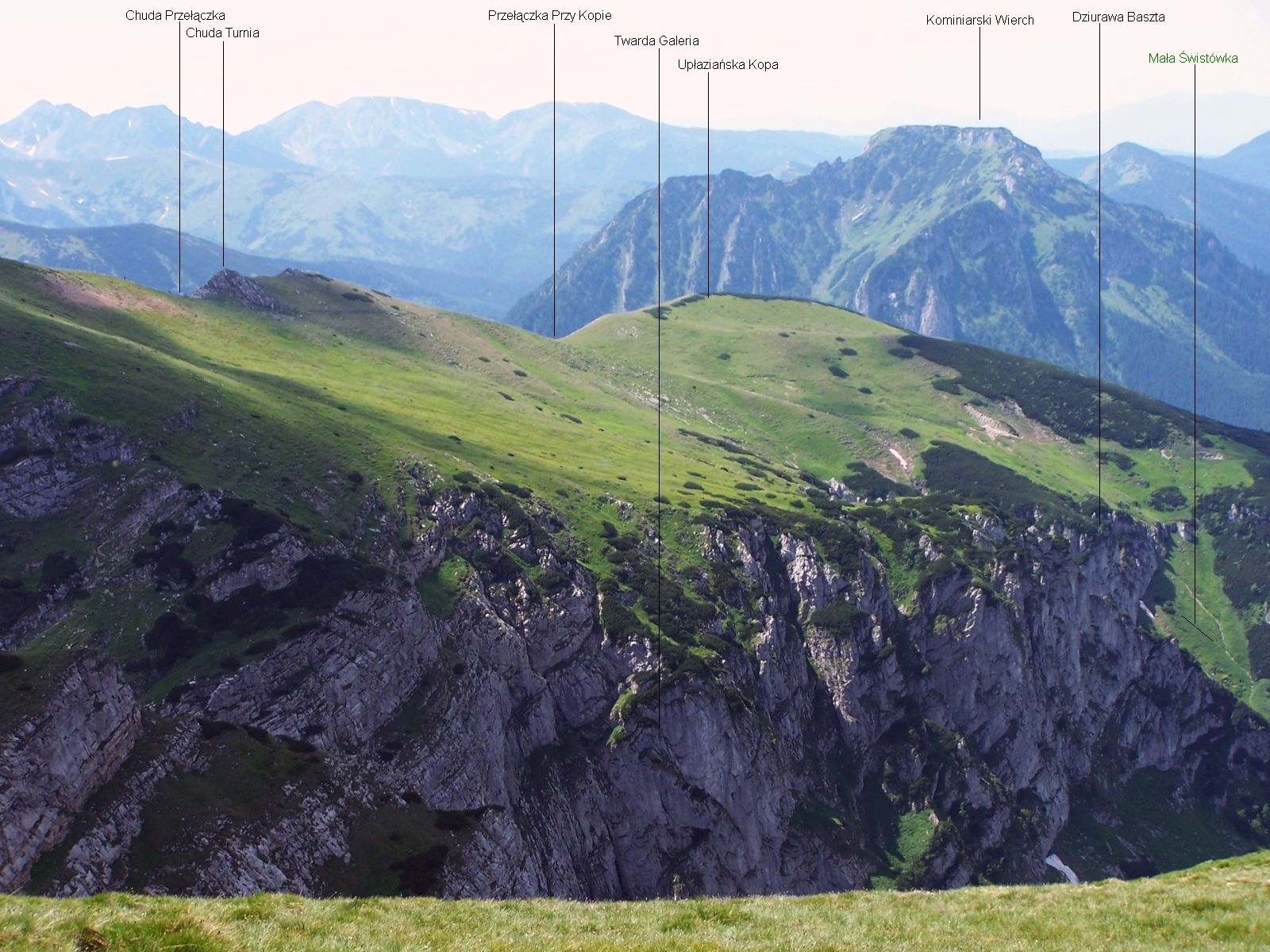 Widok z Czerwonego Grzbietu Małołączniaka